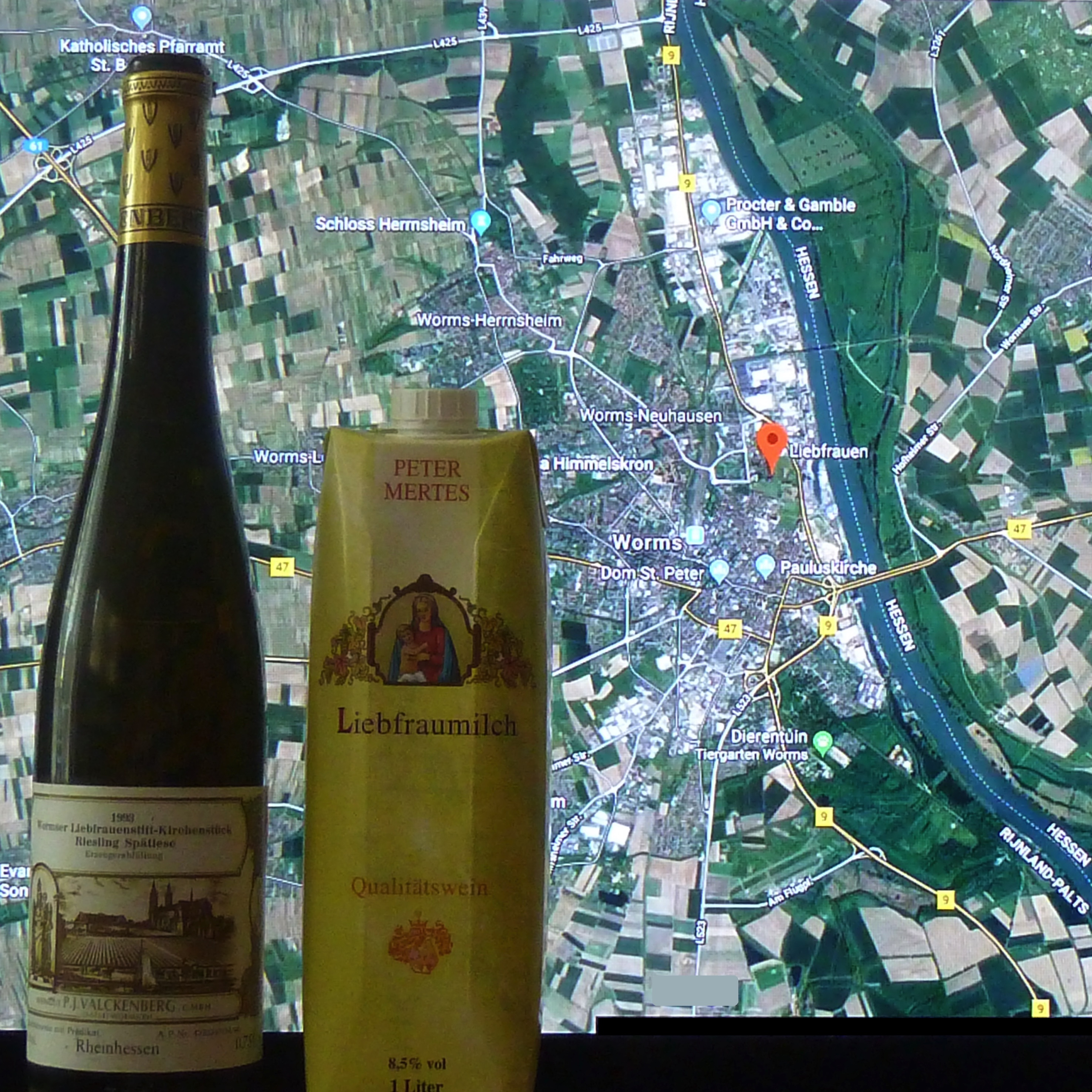 Liebfraumilch. Flasche von Weingut und Supermarktwein.